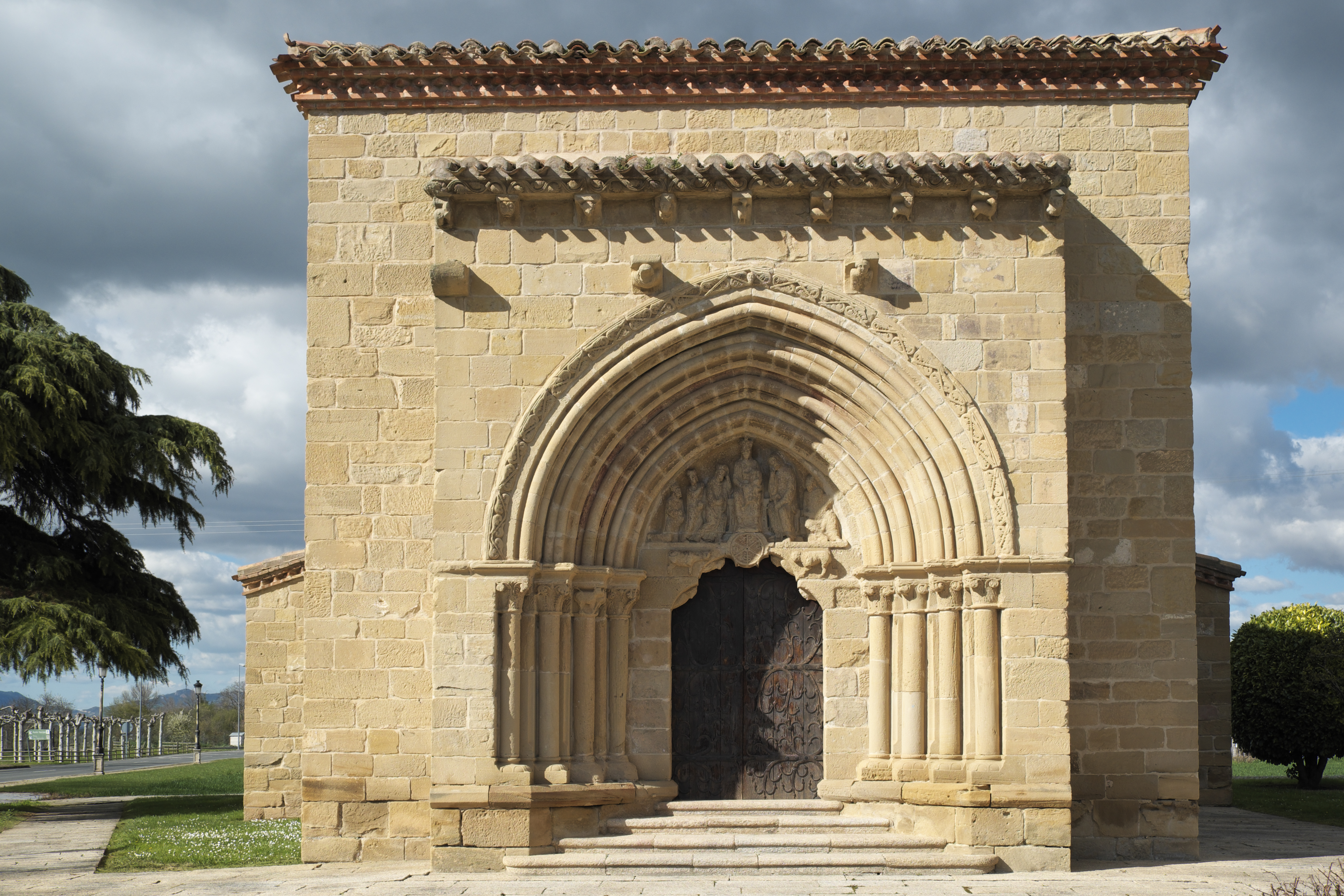 Kapelle Heilig-Kreuz (Ermita de la Santa Cruz) in Bañares in der spanischen autonomen Gemeinschaft La Rioja